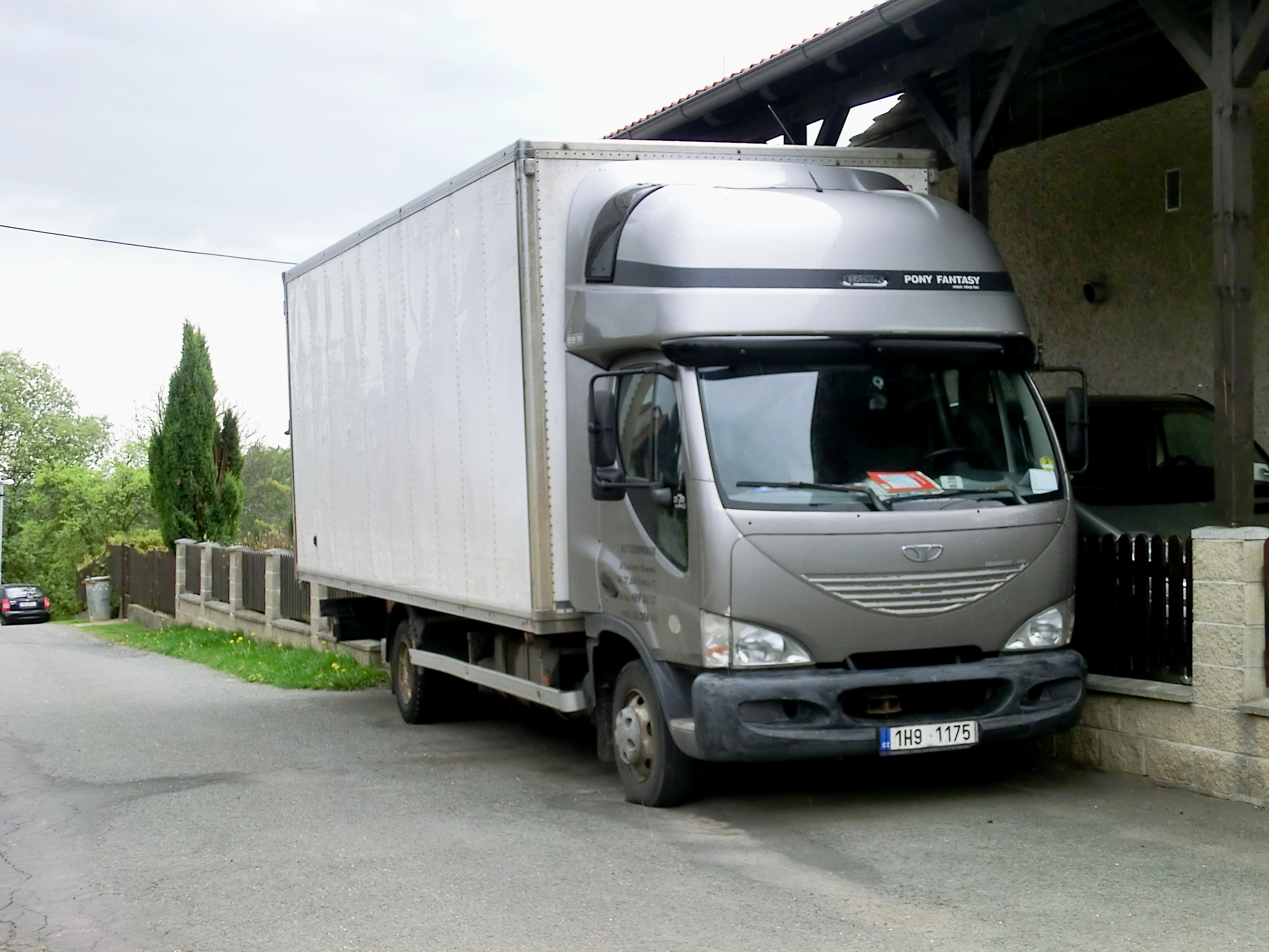 Avia D75 v provedení skříňový vůz.